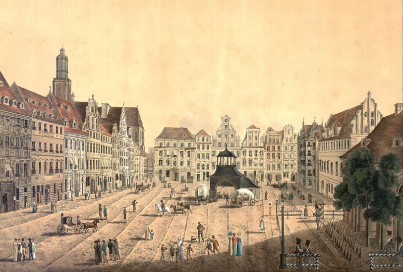 Zachodnia pierzeja Rynku i Wielka Waga Lata 1770-1850